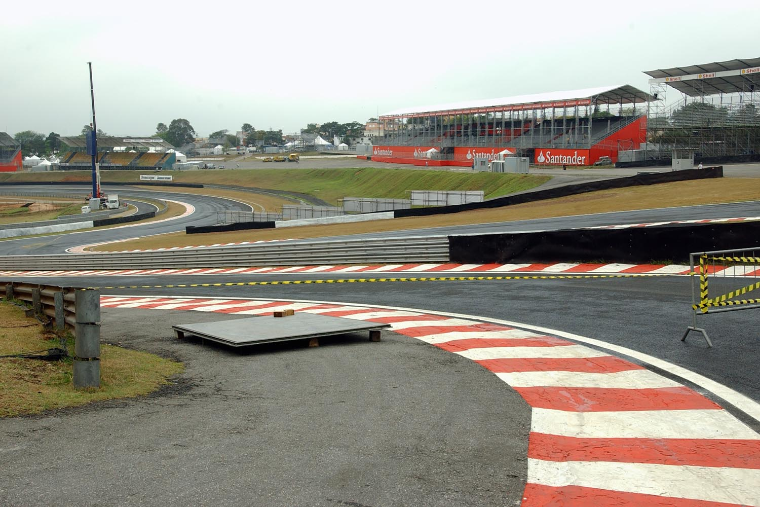 Imagem de SP